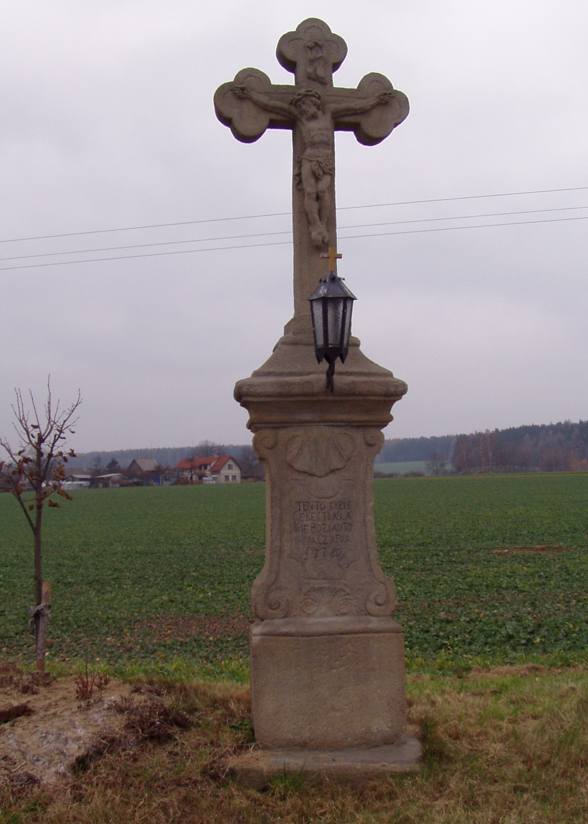 Brzice - krucifix